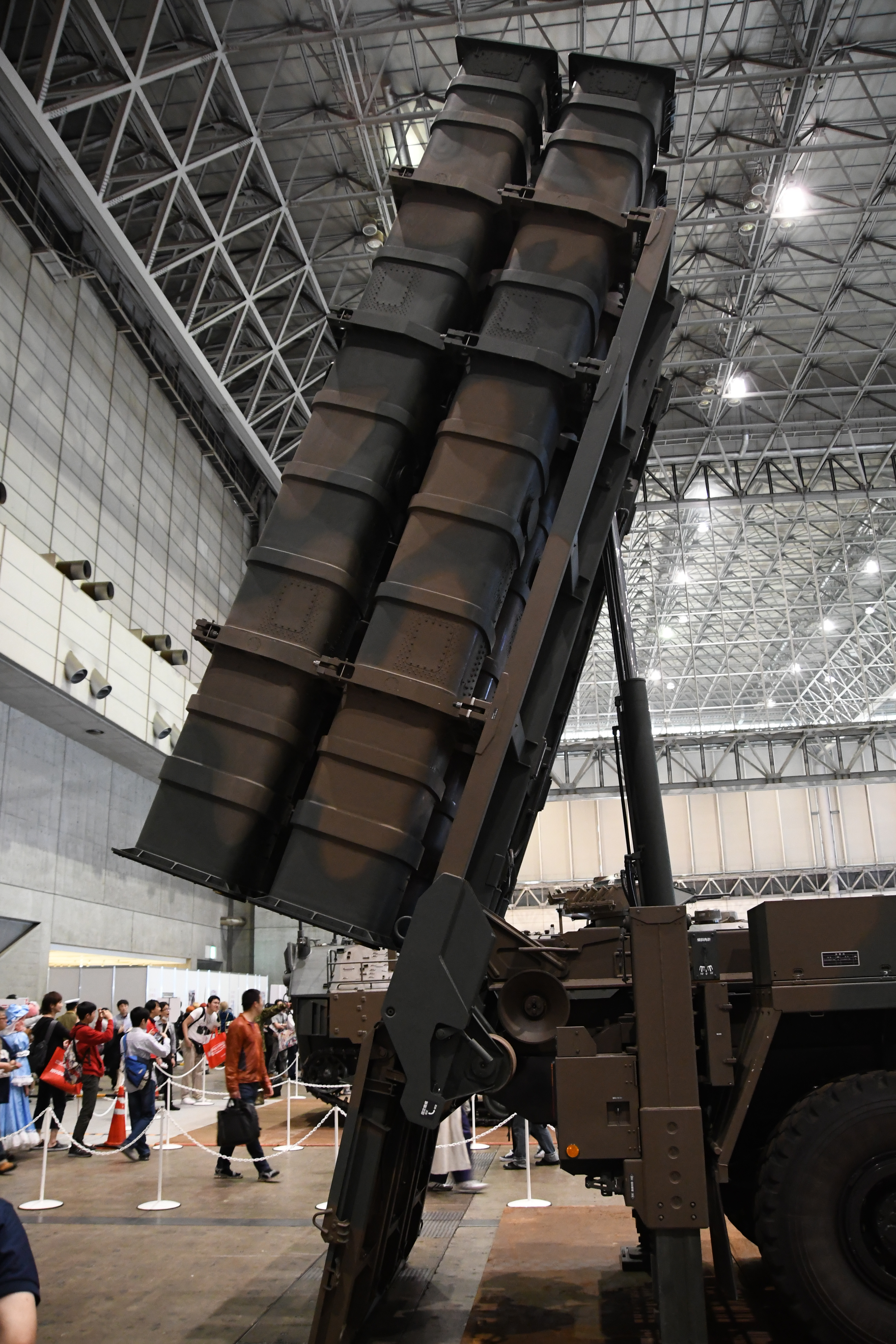 陸上自衛隊 12式地対艦誘導弾 発射装置（04-0604号車 発射形態） ミサイルキャニスター 右側面。2018年4月28日 幕張メッセにて開催された「ニコニコ超会議2018」自衛隊ブース内にて。